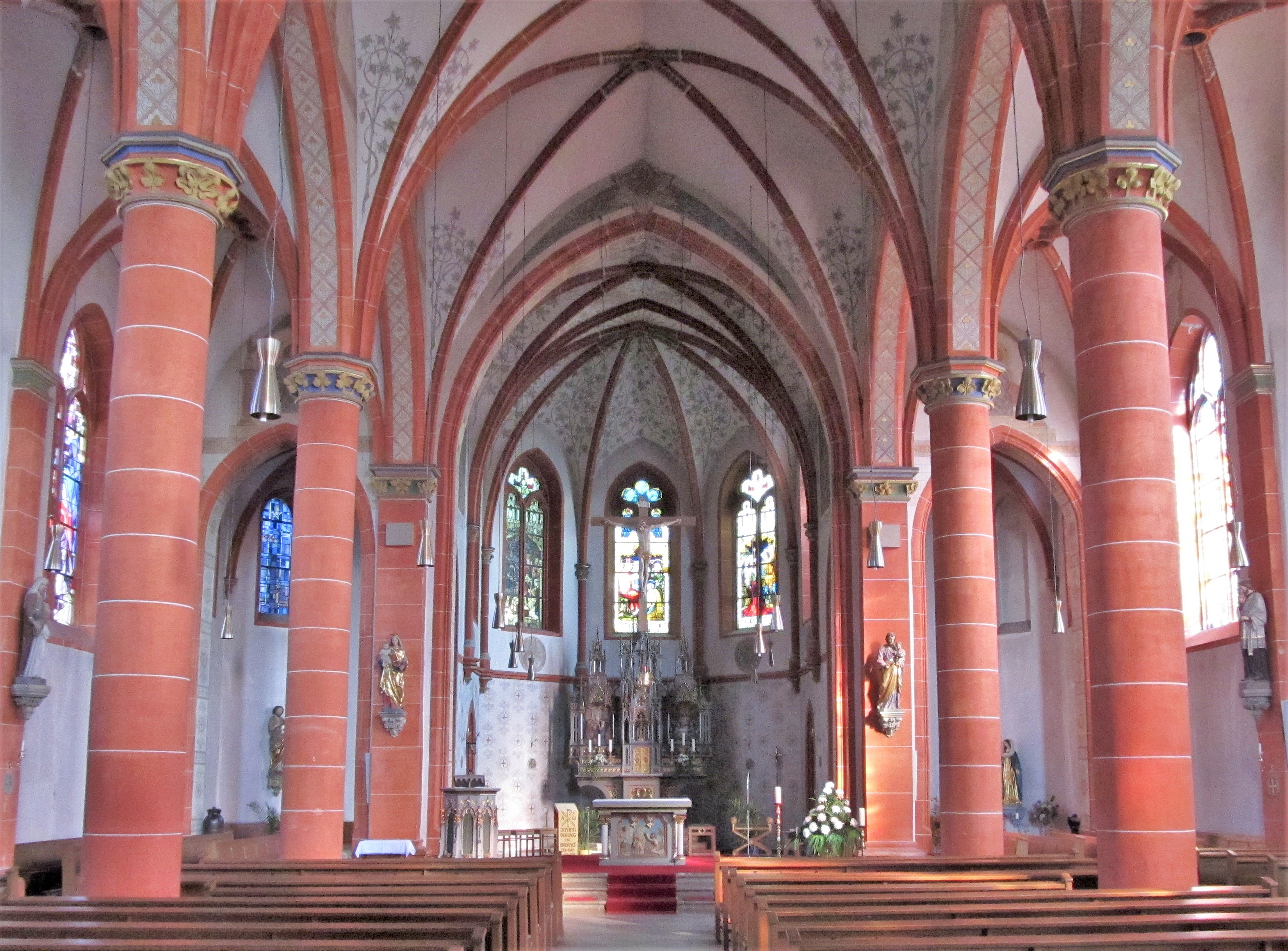 Blick ins Innere der katholischen Pfarrkirche Herz Jesu in Köllerbach, einem Stadtteil von Püttlingen, Saarland